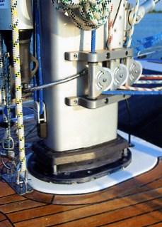 Mastfuß. Foto: Seebeer